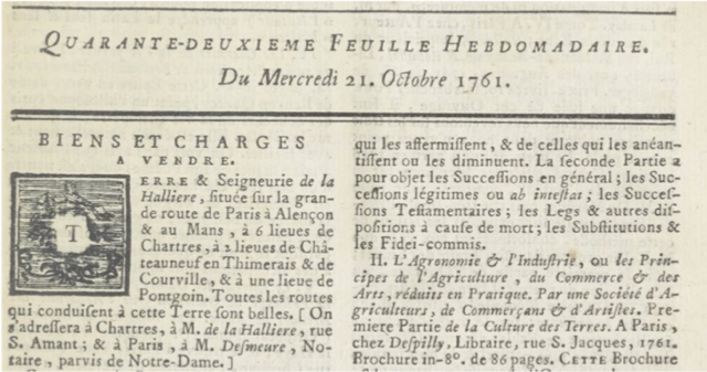 Vente par M. de Bernard de son domaine de la Hallière